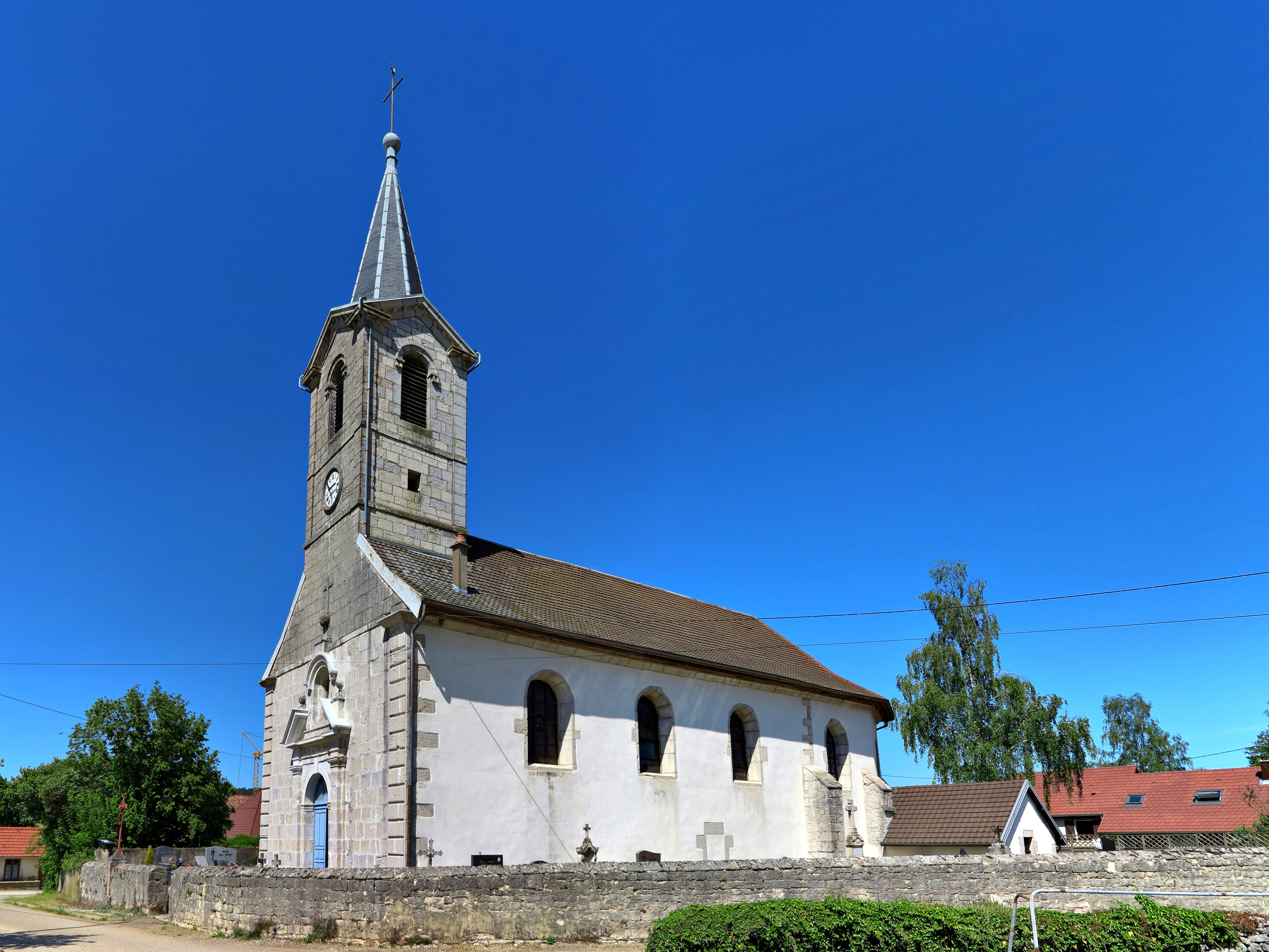 L'église